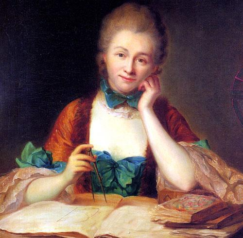 Depicted person: Gabrielle Émilie Le Tonnelier de Breteuil, marquise du Châtelet (1706-1749), French mathematician and physicist